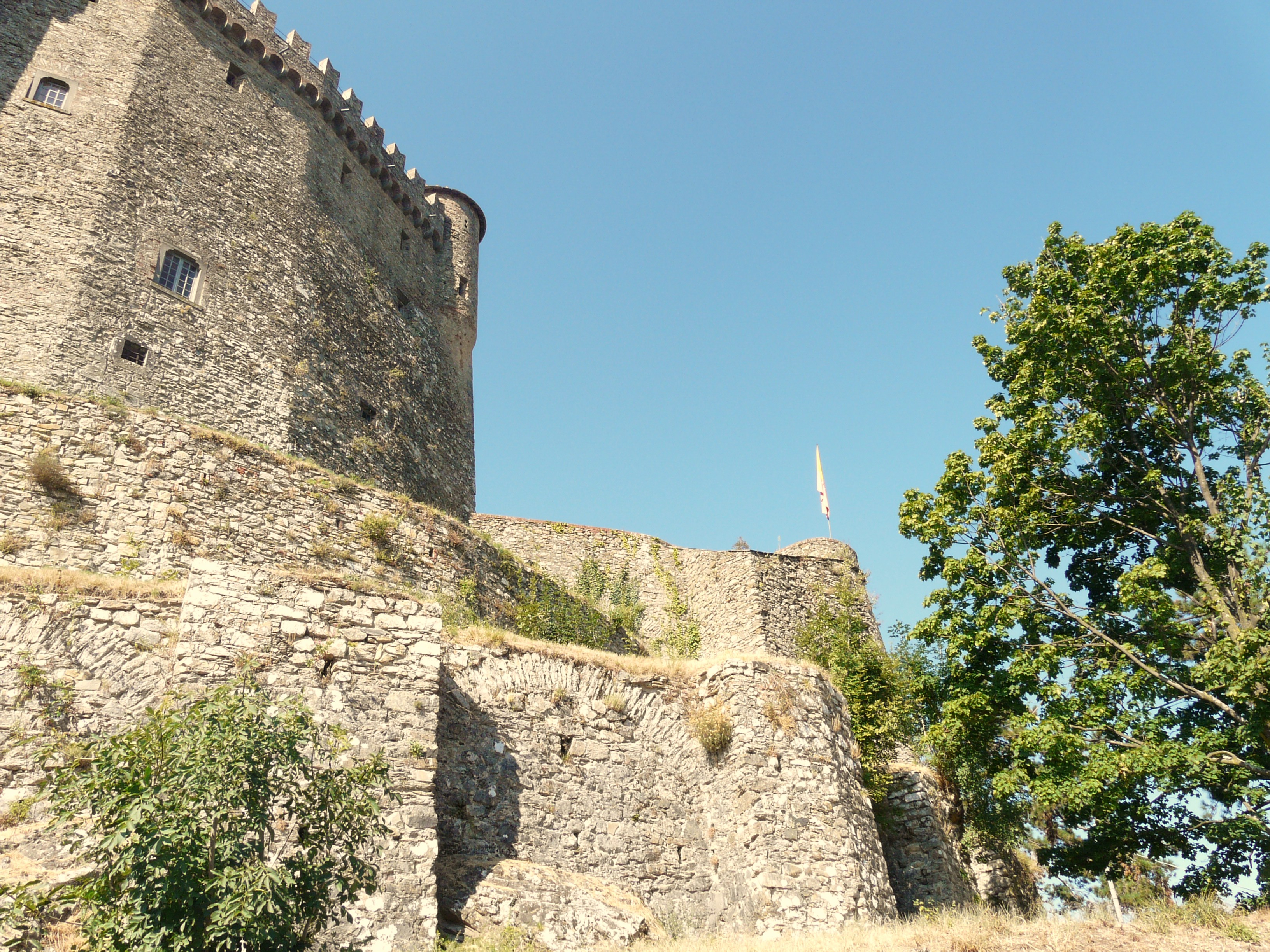 Castello Malaspina, Fosdinovo, Toscana, Italia